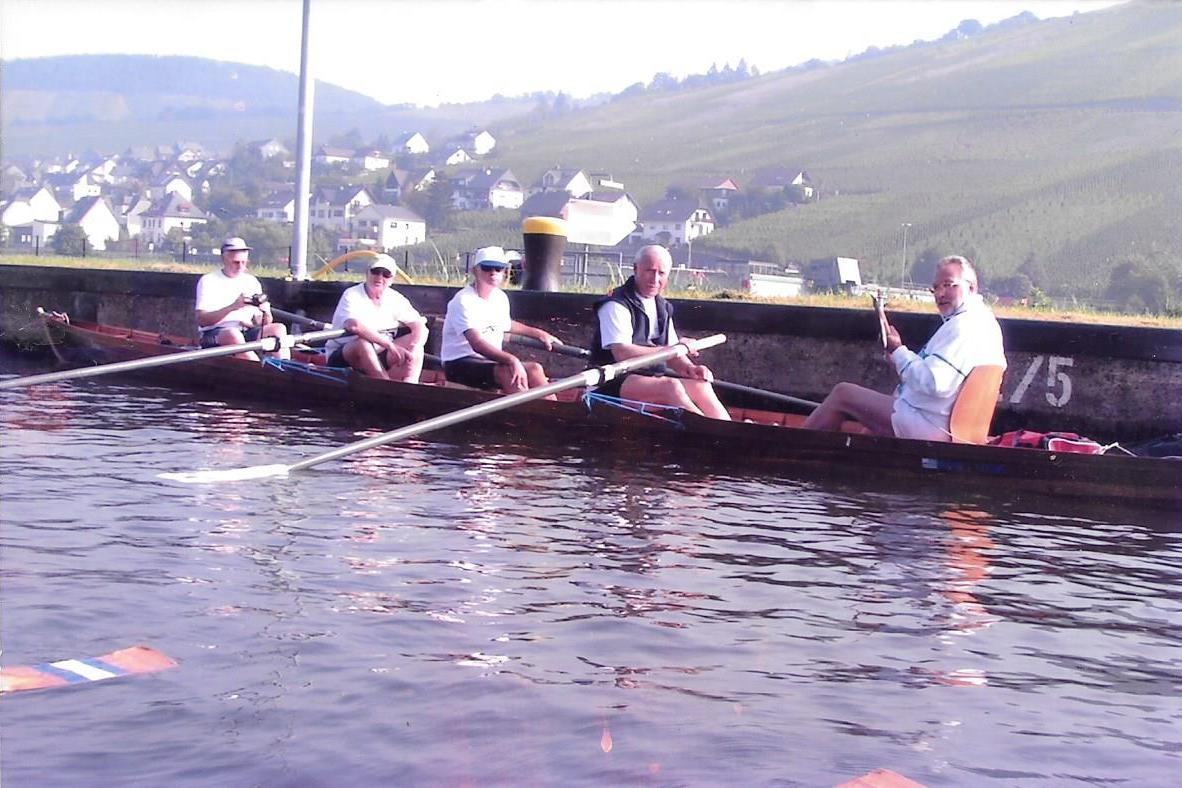 חברי איגוד החתירה בעת שיוט בתעלה בגרמניה. שלישי מימין גדעון רז.